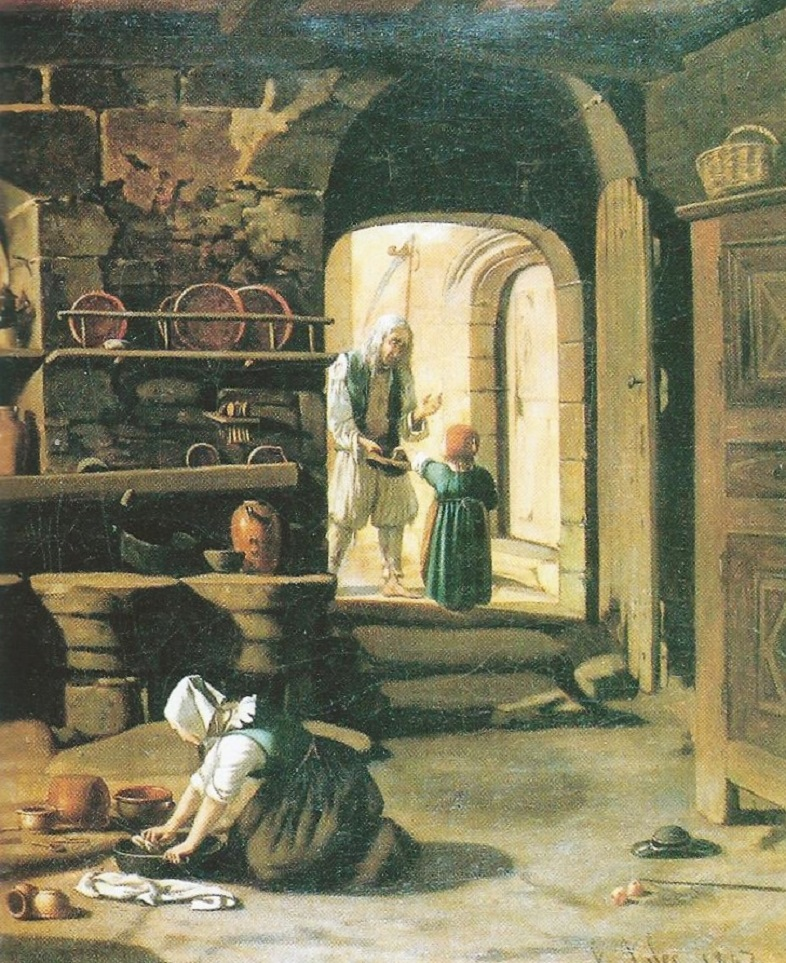 Cette oeuvre montre l'intérieur d'une maison pauvre du quartier de Kerfeunteun à Quimper.